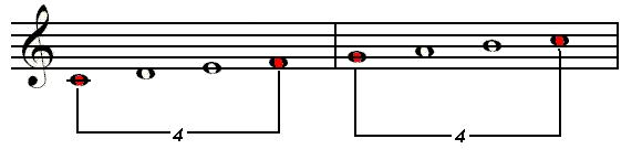 Selberstelltes Bild. Es dient zur Veranschaulichung der Leiterbildung durch Tetrachorde in meinem Artikel zum Thema Heptatonik. Es beinhaltet eine Tonleiter.